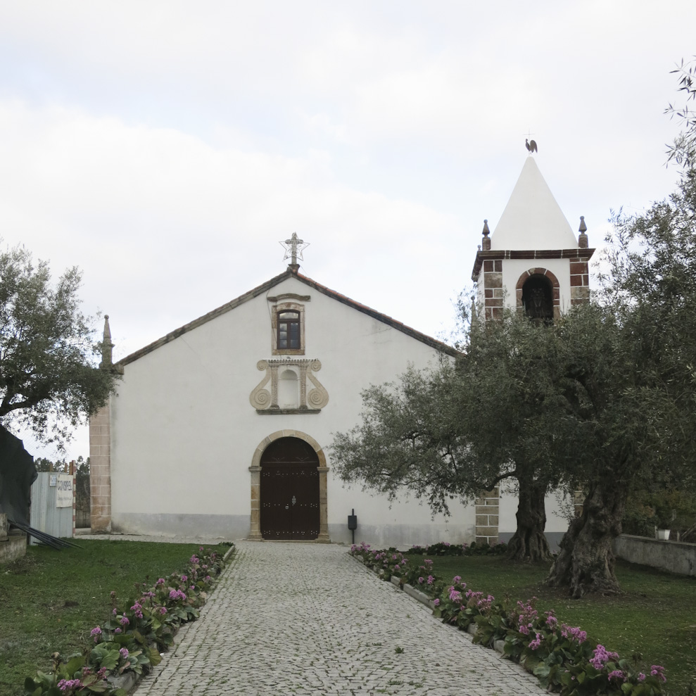 Igreja Pombeiro da Beira